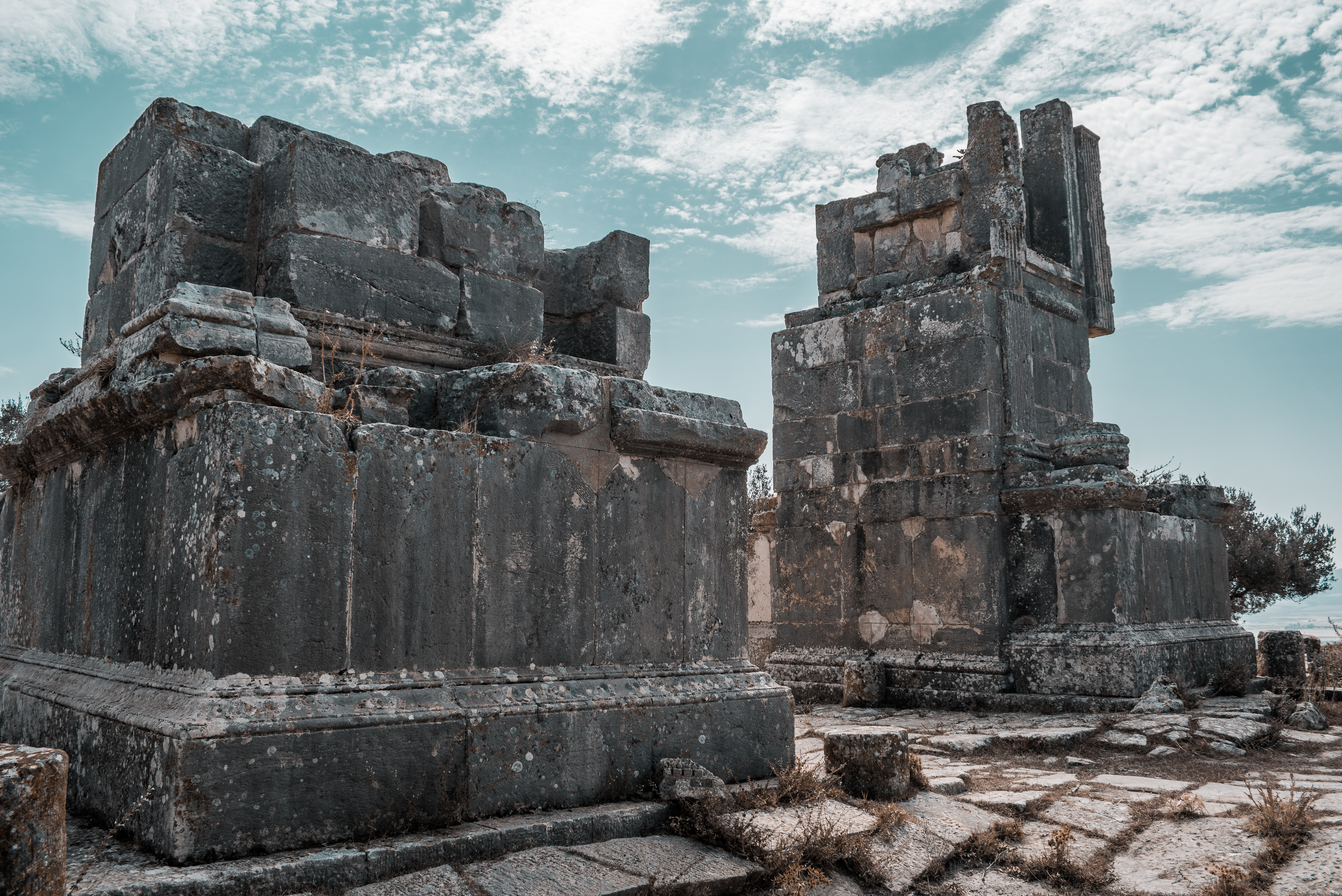 Montants de la porte de l'Est, dont l'arc est écroulé, au bas du village, à 200 m. environ du grand mausolée